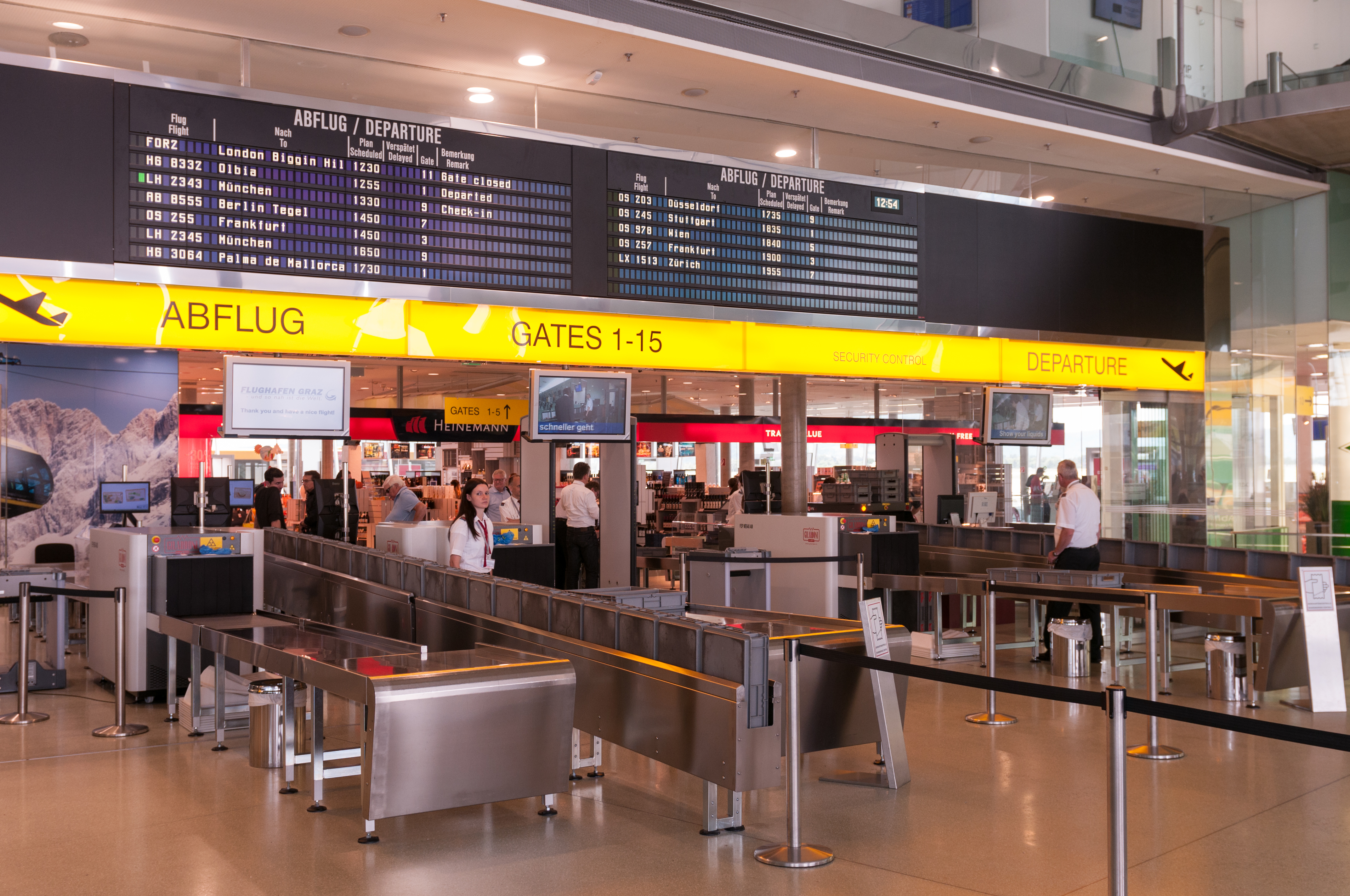 Flughafen Graz